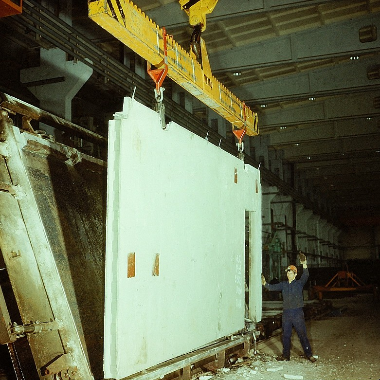 Original image description from the Deutsche Fotothek Betonwerker